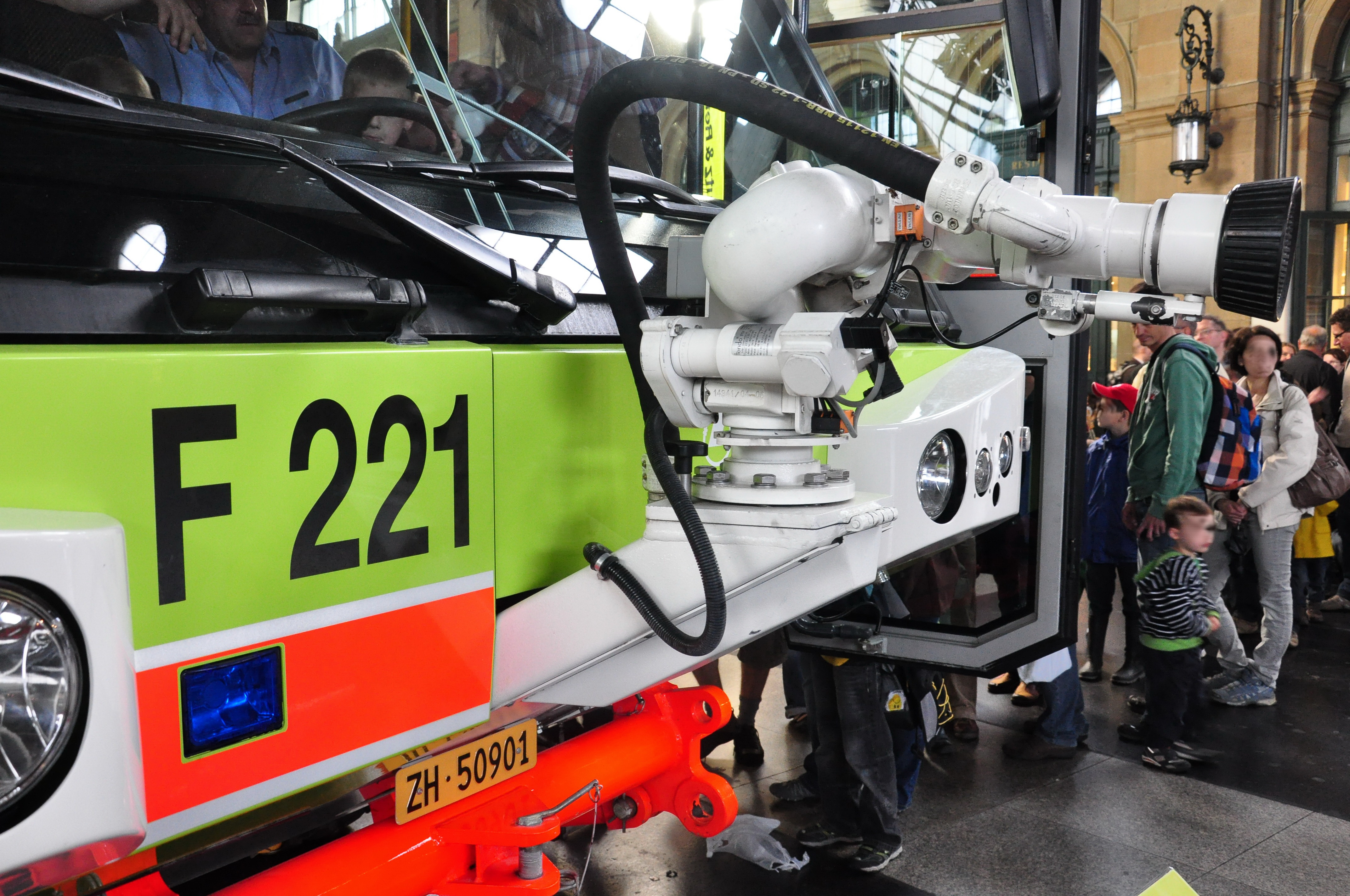 10 Jahre SRZ Jubiläumsanlass (13. und 14. Mai 2011) von Schutz & Rettung in der Haupthalle des Hauptbahnhofs in Zürich (Switzerland)